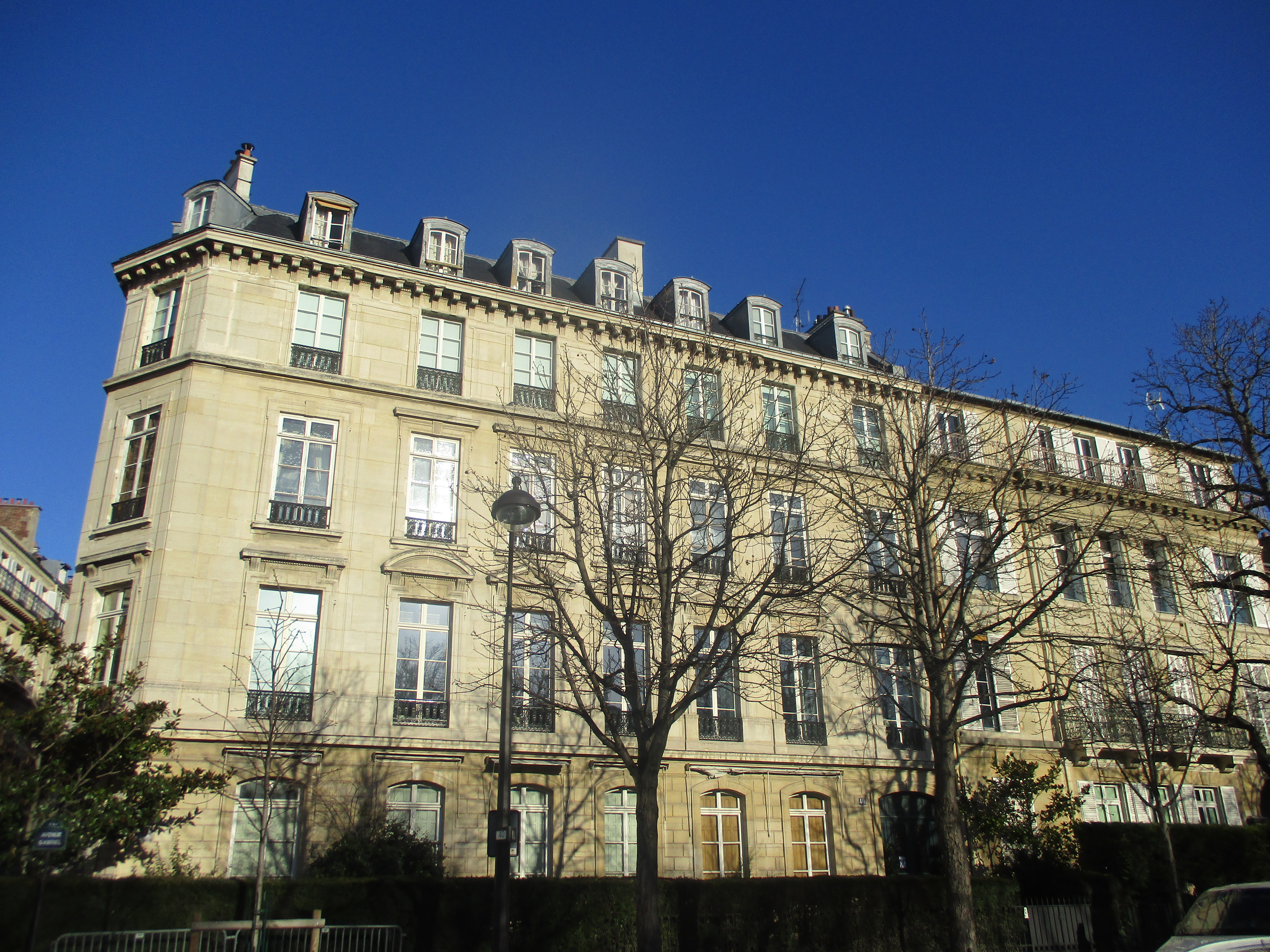 40 avenue Gabriel, Paris VIIIe. Hôtel Blanc, construit pour Edmond Blanc